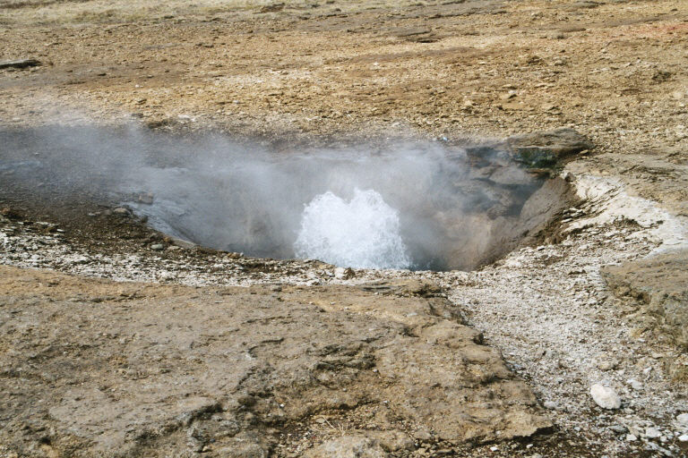 This image was copied from de. The original description was: Litli Geysir, Island, GNU-FDL Ich habe das Bild selbst im April 2004 aufgenommen. Es zeigt eine der kleineren heißen Quellen im Haukadalur in Island, den Litli Geysir. Reykholt 11:41, 23. Mai 2004 (CEST)